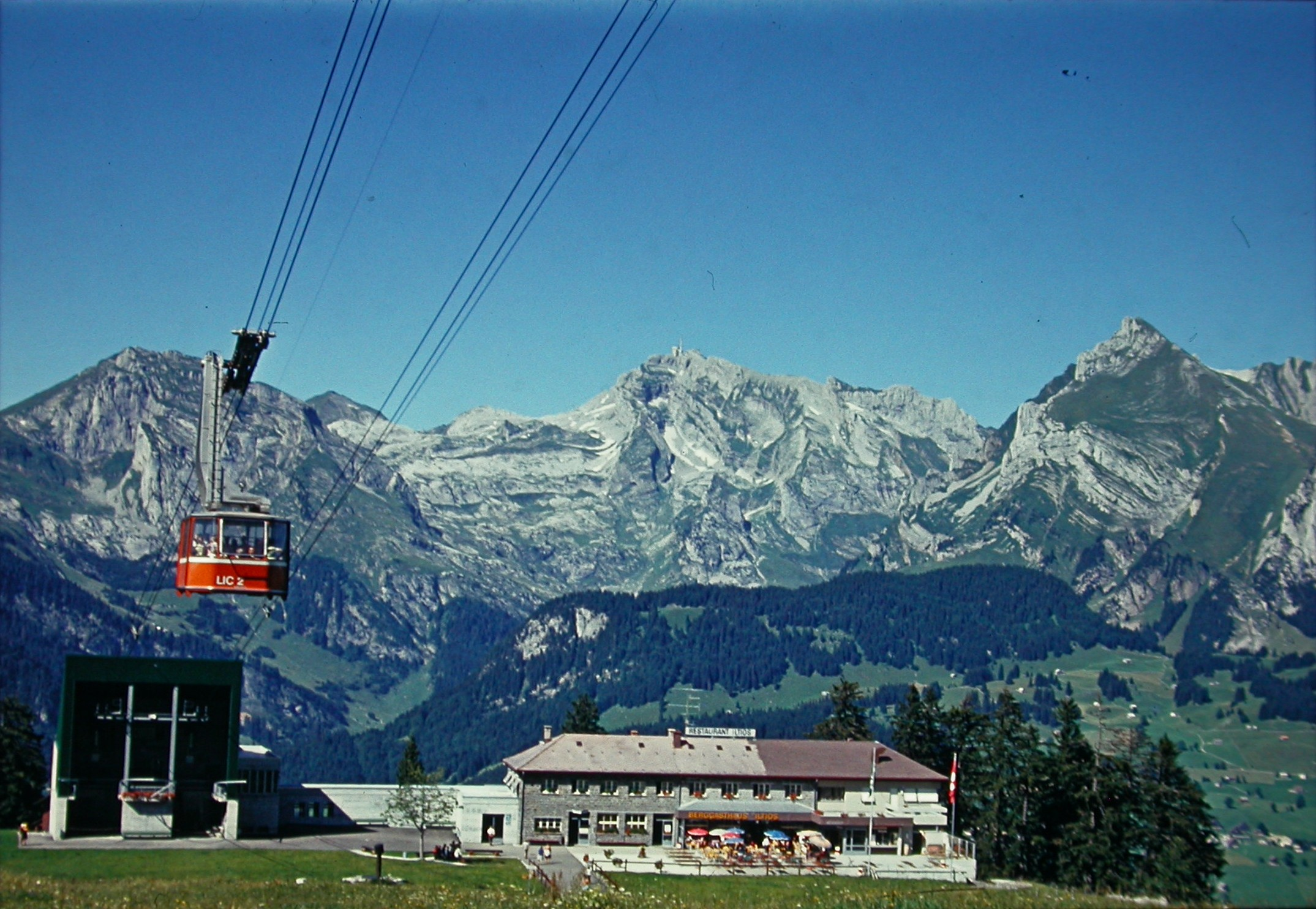 Iltios und dahinter Säntis am 13 August 1974